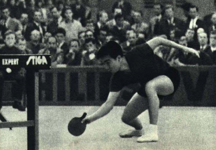 1965-7 1965年 28届世界锦标赛 张燮林